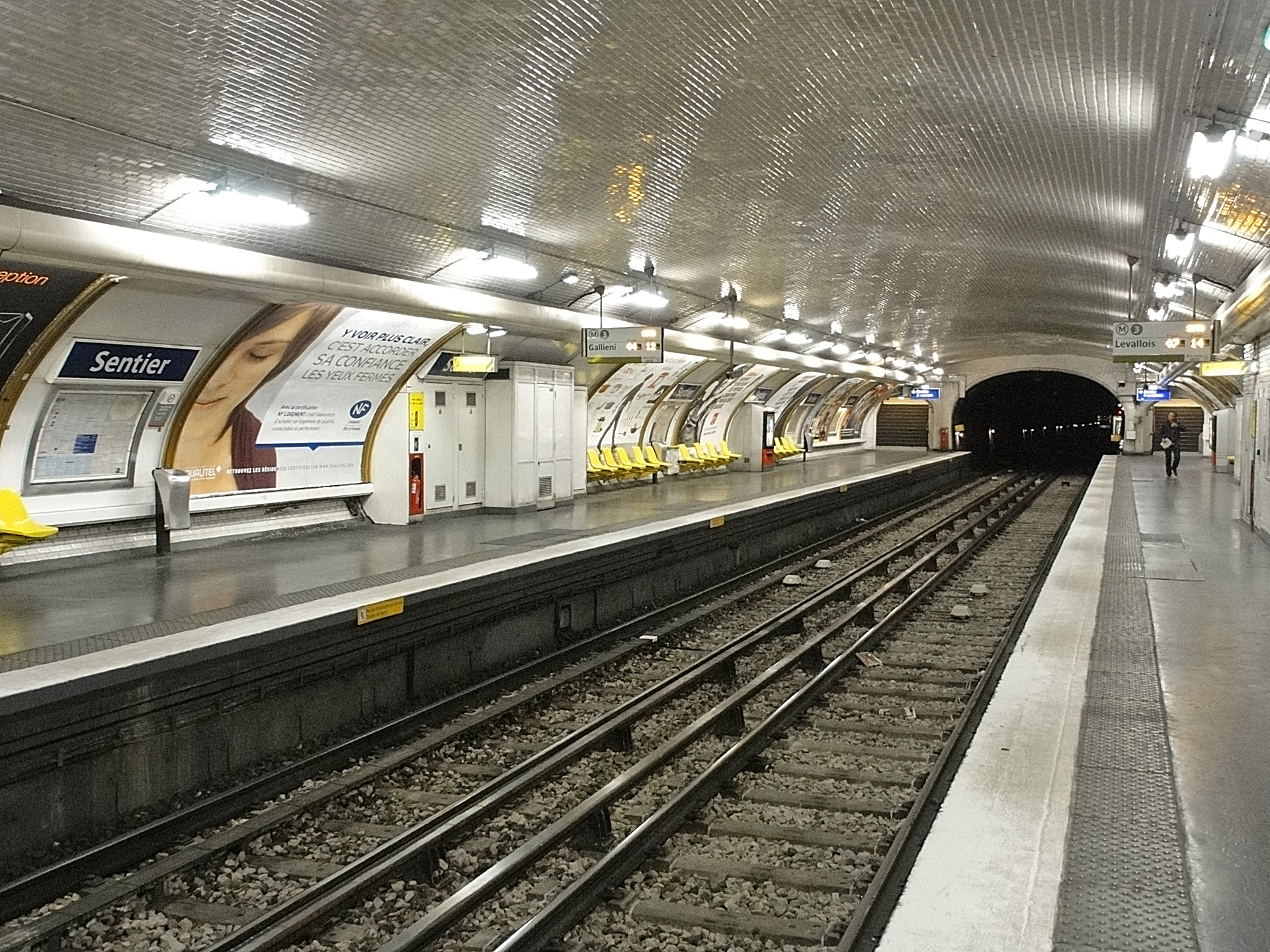 Station Sentier de la ligne 3 du métro de Paris, France.